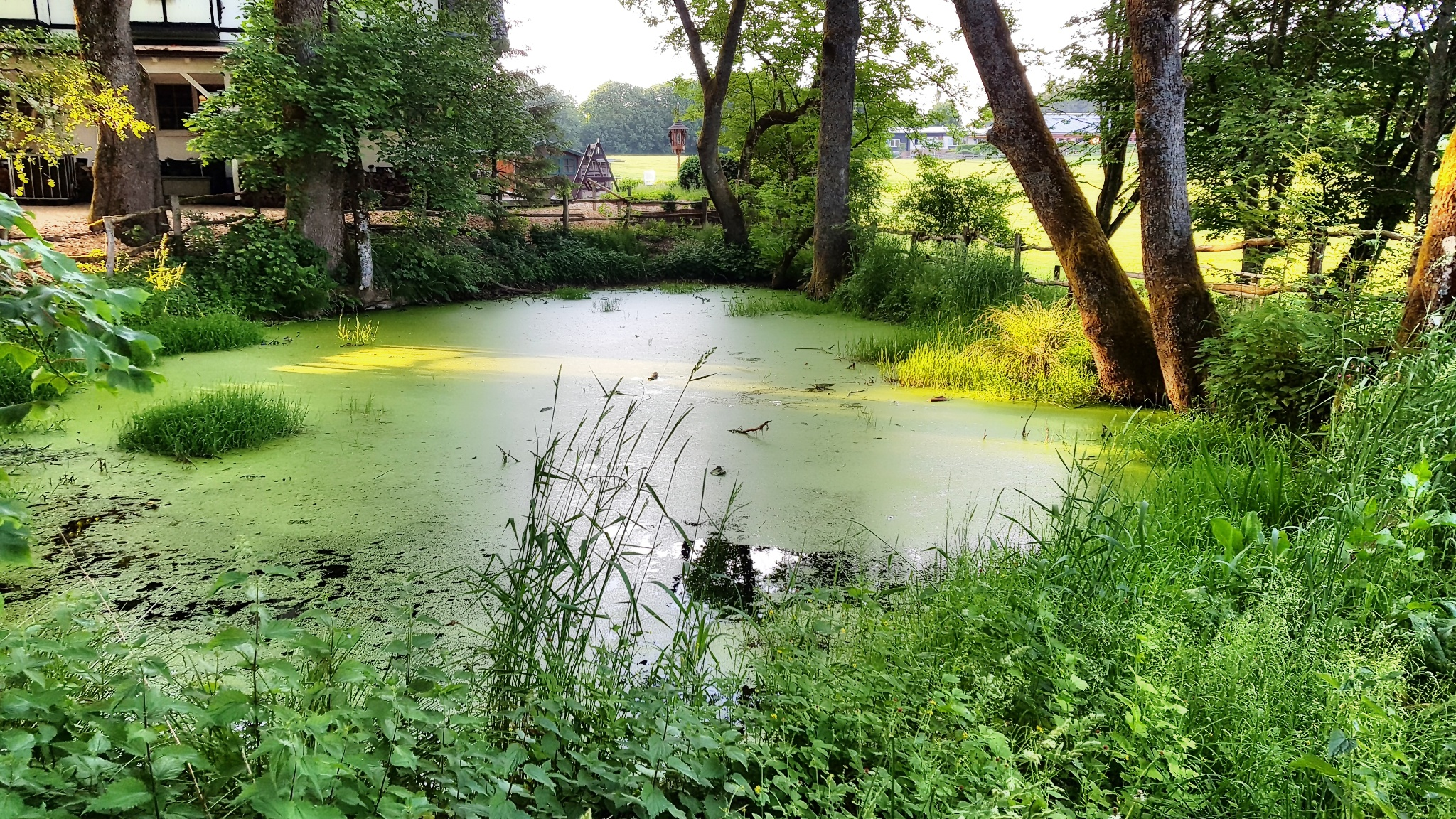 Blick auf den Quellteich der Lahn in Netphen-Lahnhof (Kreis Siegen-Wittgenstein, Deutschland).